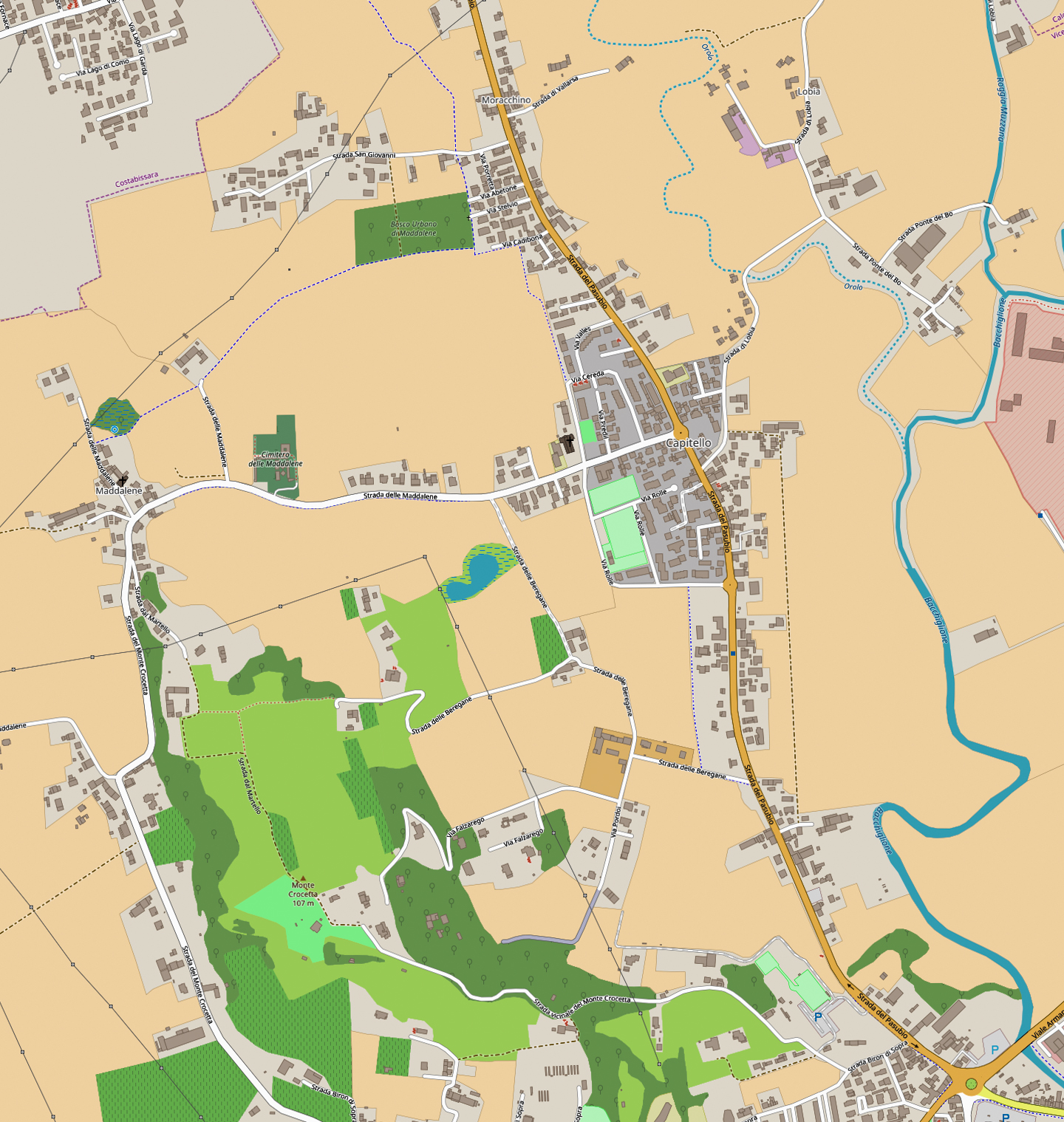 Mappa Viale Trento Maddalene Capitello Moracchino